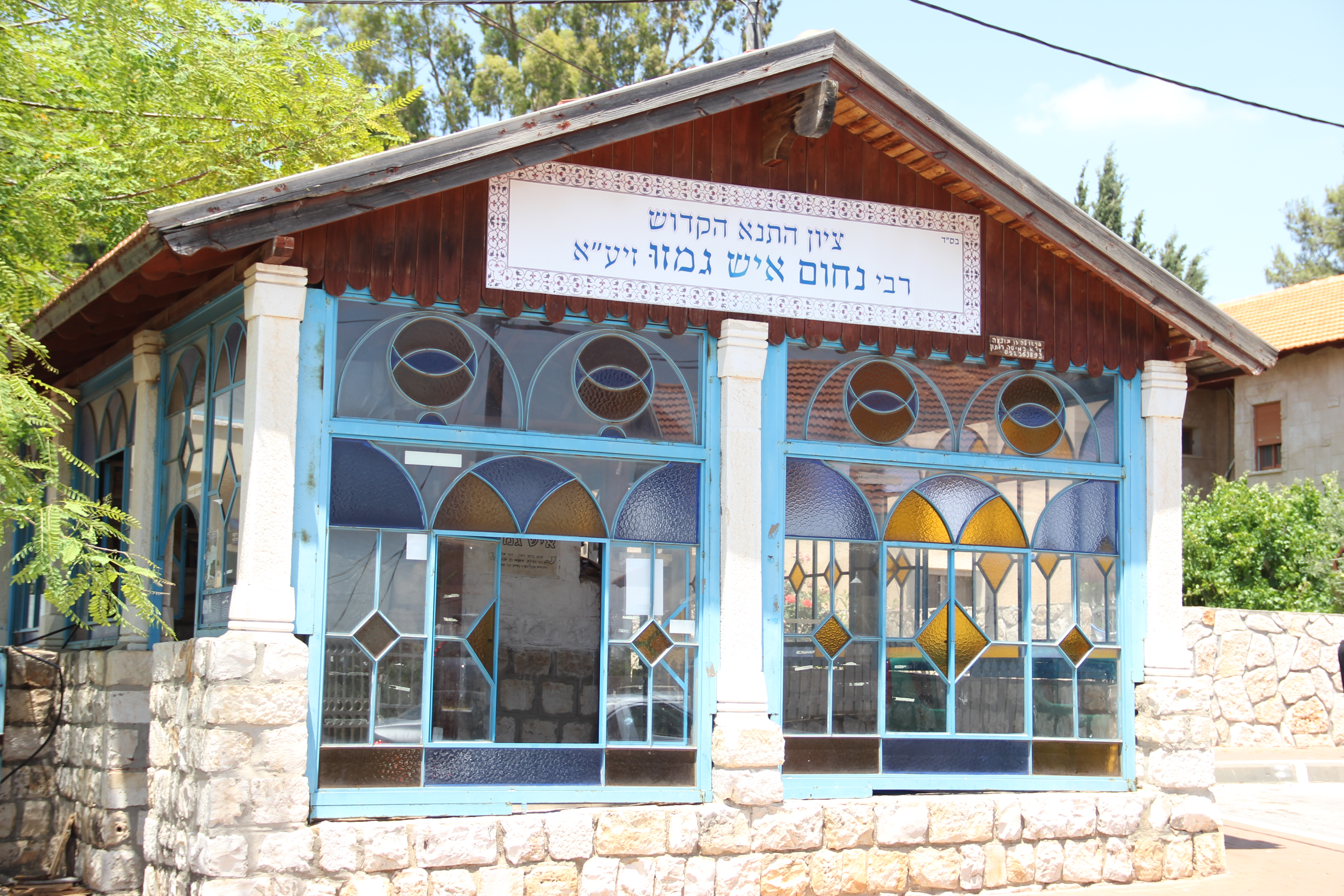 קברו של נחום איש גמזו בצפת